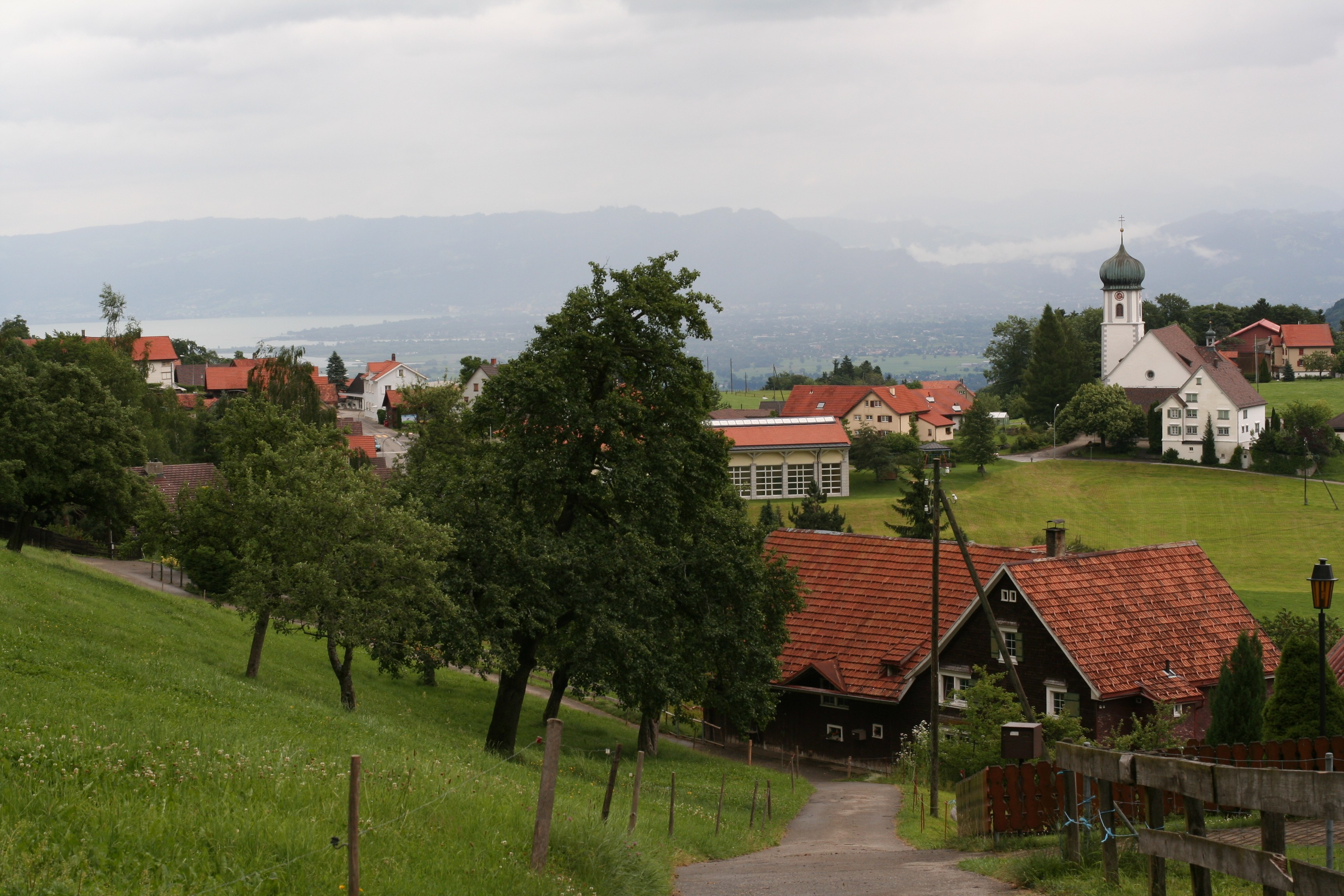 Grub SG, Gemeinde Eggersriet. Blick richtung Bodensee und auf die katholische Kirche im Dorf.